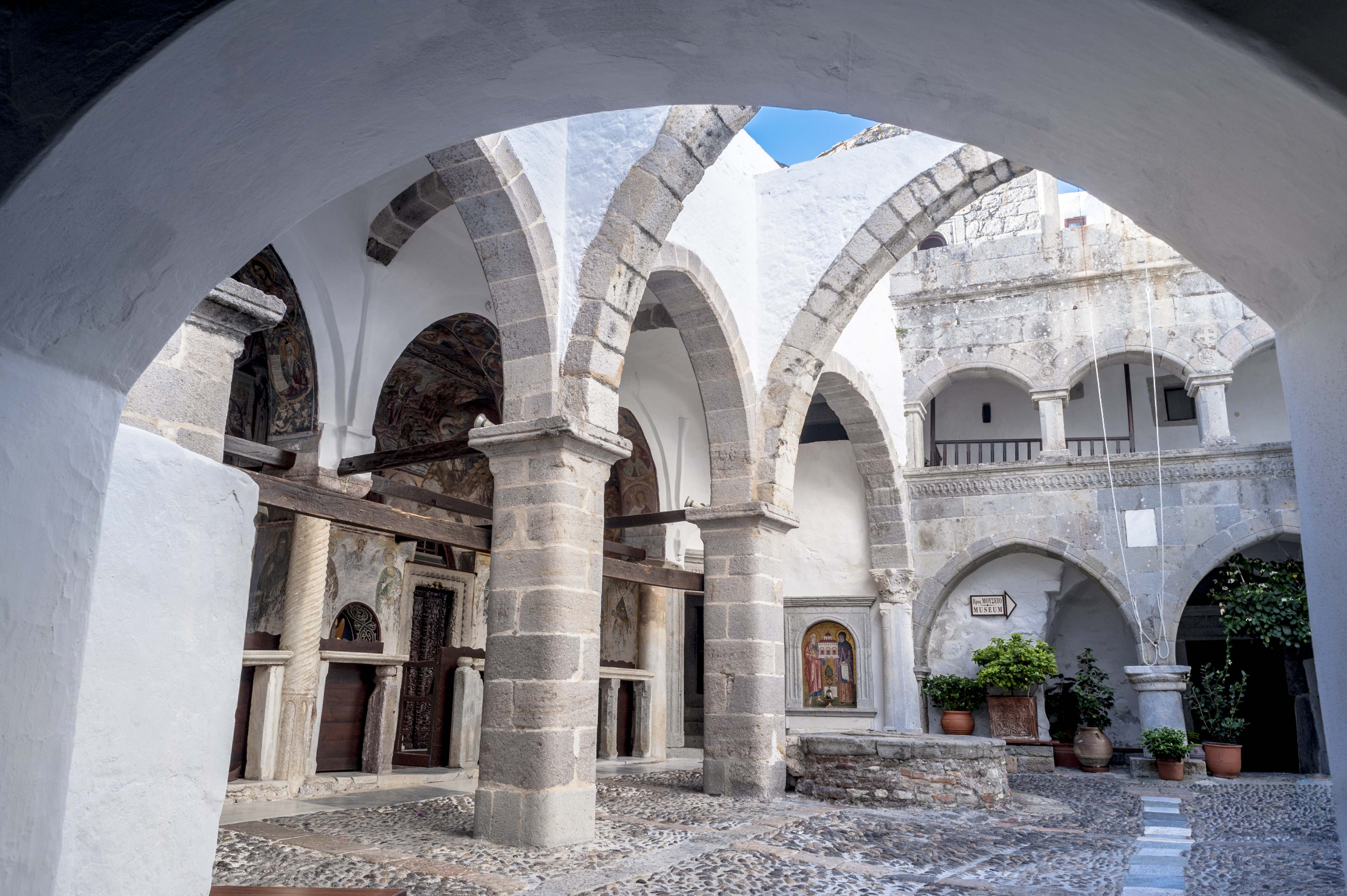 Το Μοναστήρι του Αγίου Ιωάννη του Θεολόγου στην Πάτμο εσωτερικά.